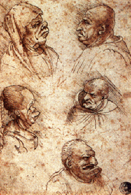 auteur (Léonard de Vinci...) mort il y a plus de 70 ans